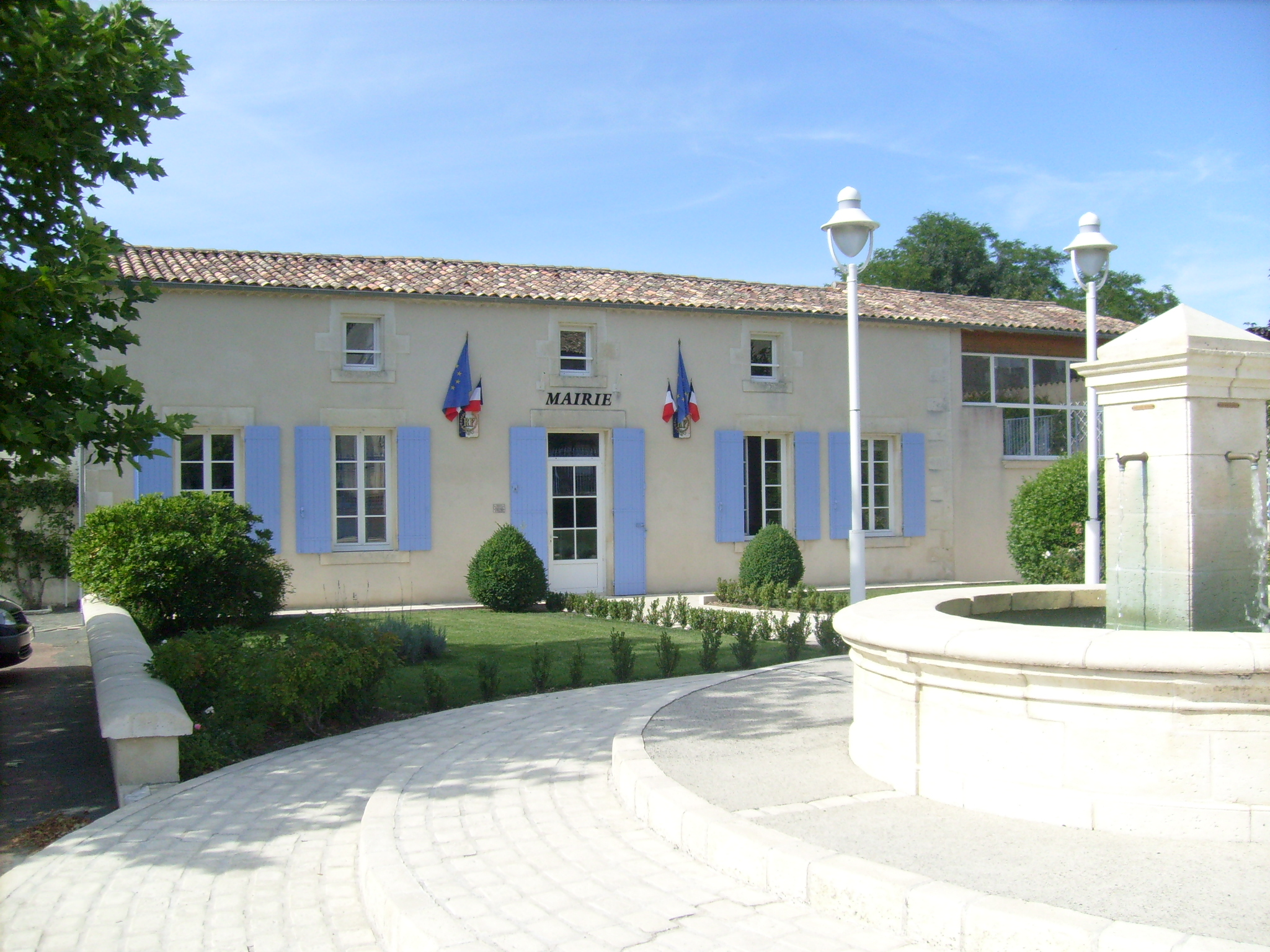 Mairie de Saint-Thomas-de-Cônac